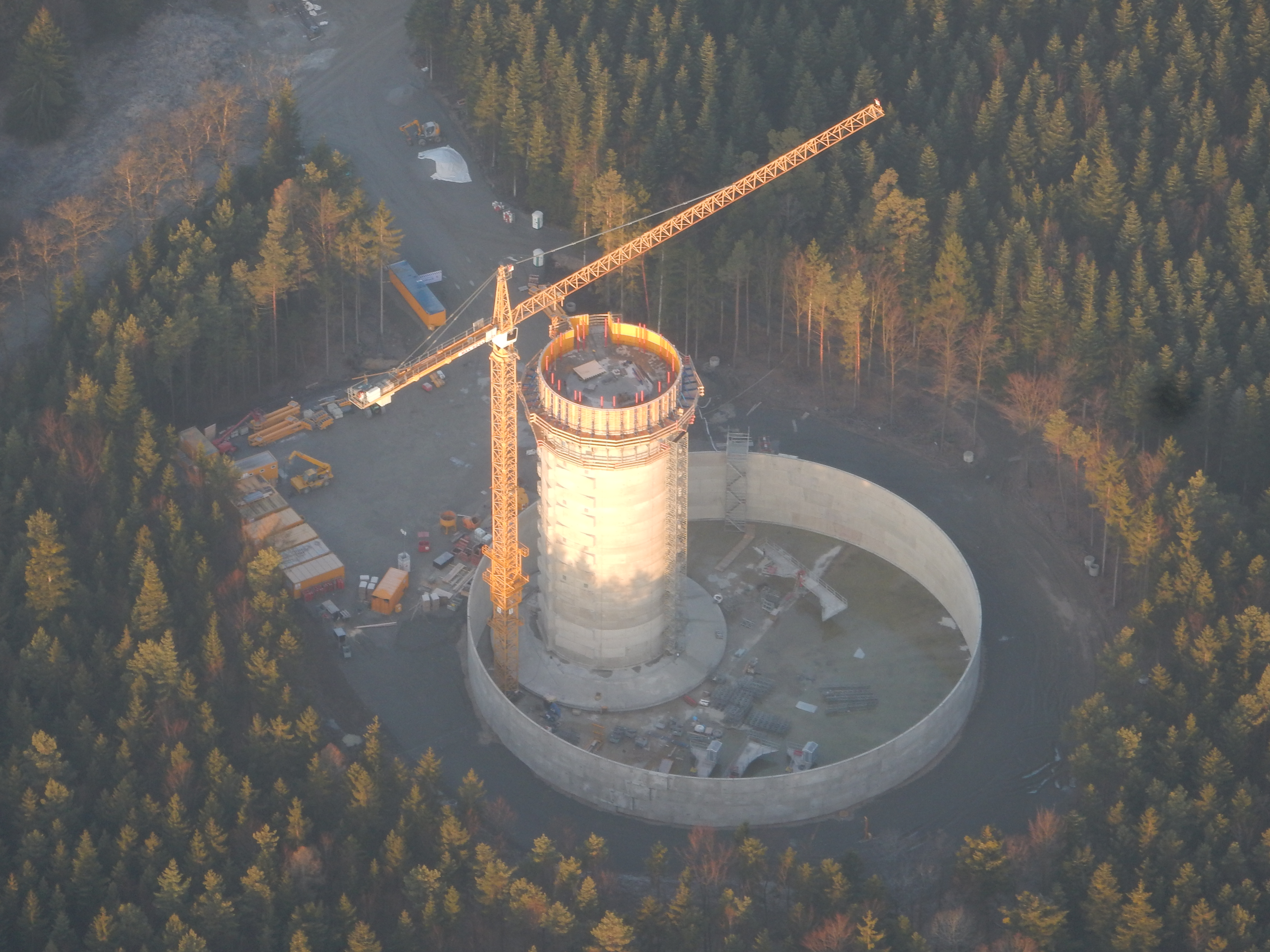 Naturstromspeicher Gaildorf im Bau Februar 2017